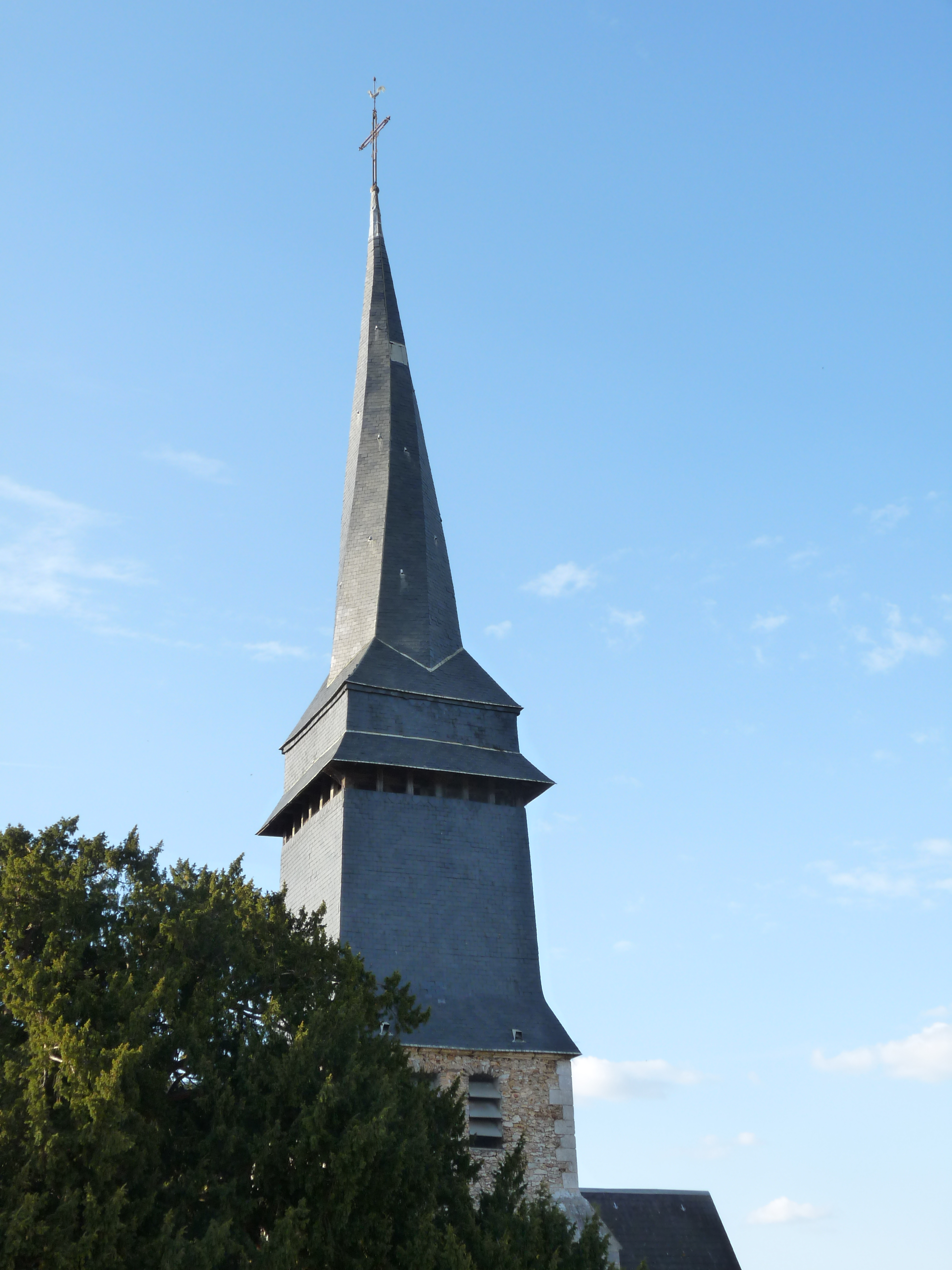 le clocher tors de Saint-Aubin-sur-Gaillon (Eure)